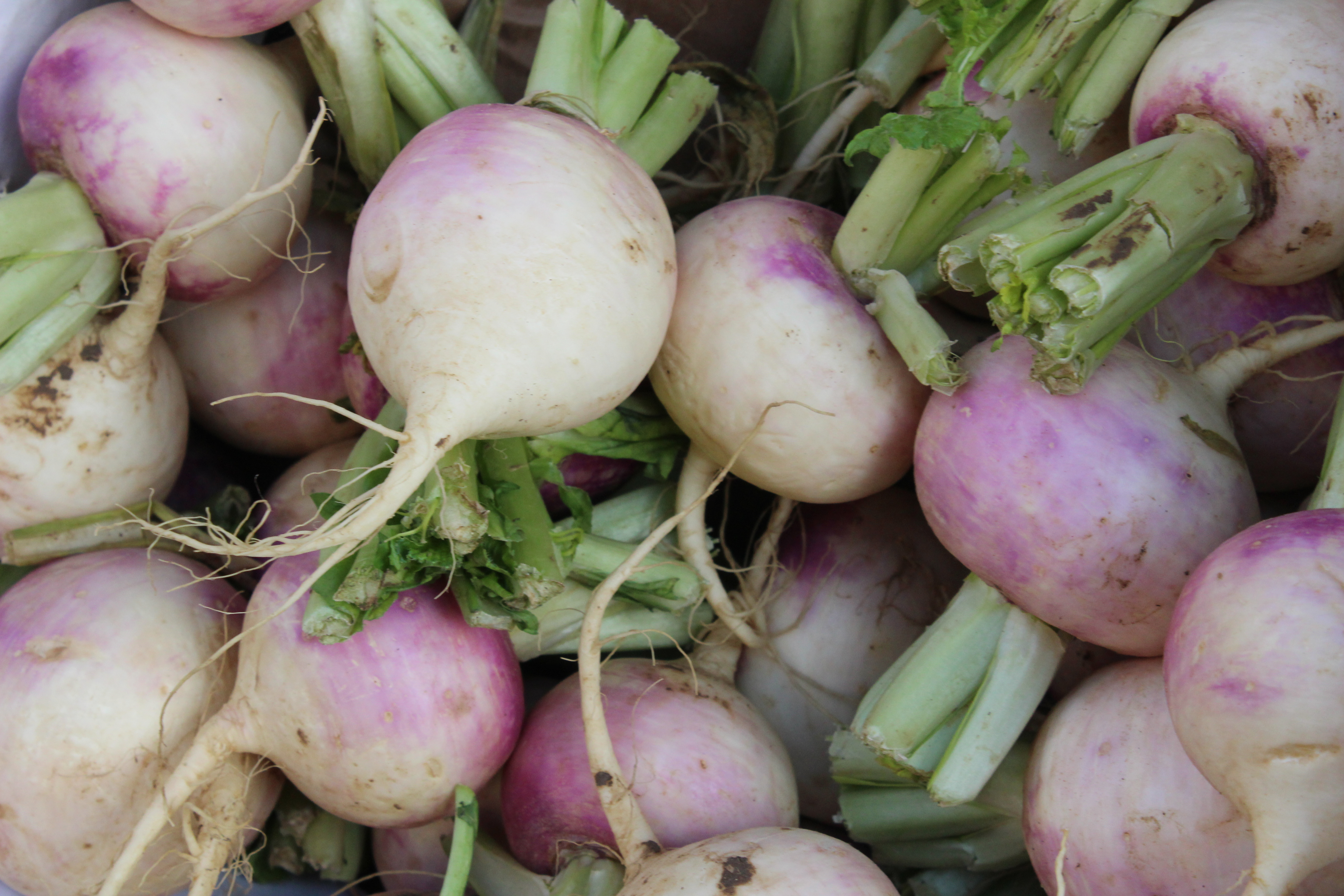 דוכן לפת בשוק נצרת. התמונה צולמה בינואר 2017